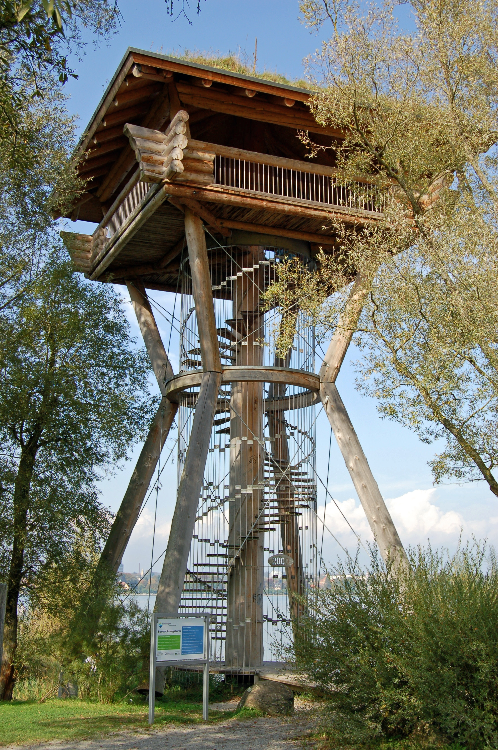 Dieser wuchtige Aussichtsturm steht in der Seeufer-Parkanlage in Kreuzlingen und ist ganz hip bei Kindern.